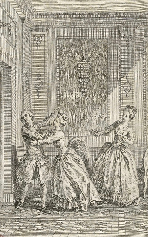 Antoine-Jean Duclos (1742–1795) nach Hubert-François Gravelot (1699–1773): Illustration zu Pierre-Augustin Caron de Beaumarchais (1732–1799), Eugénie, drame en cinq actes en prose, Akt III, Szene VIII, Merlin, Paris 1767, vor S. 55. Bibliothèque nationale de France.